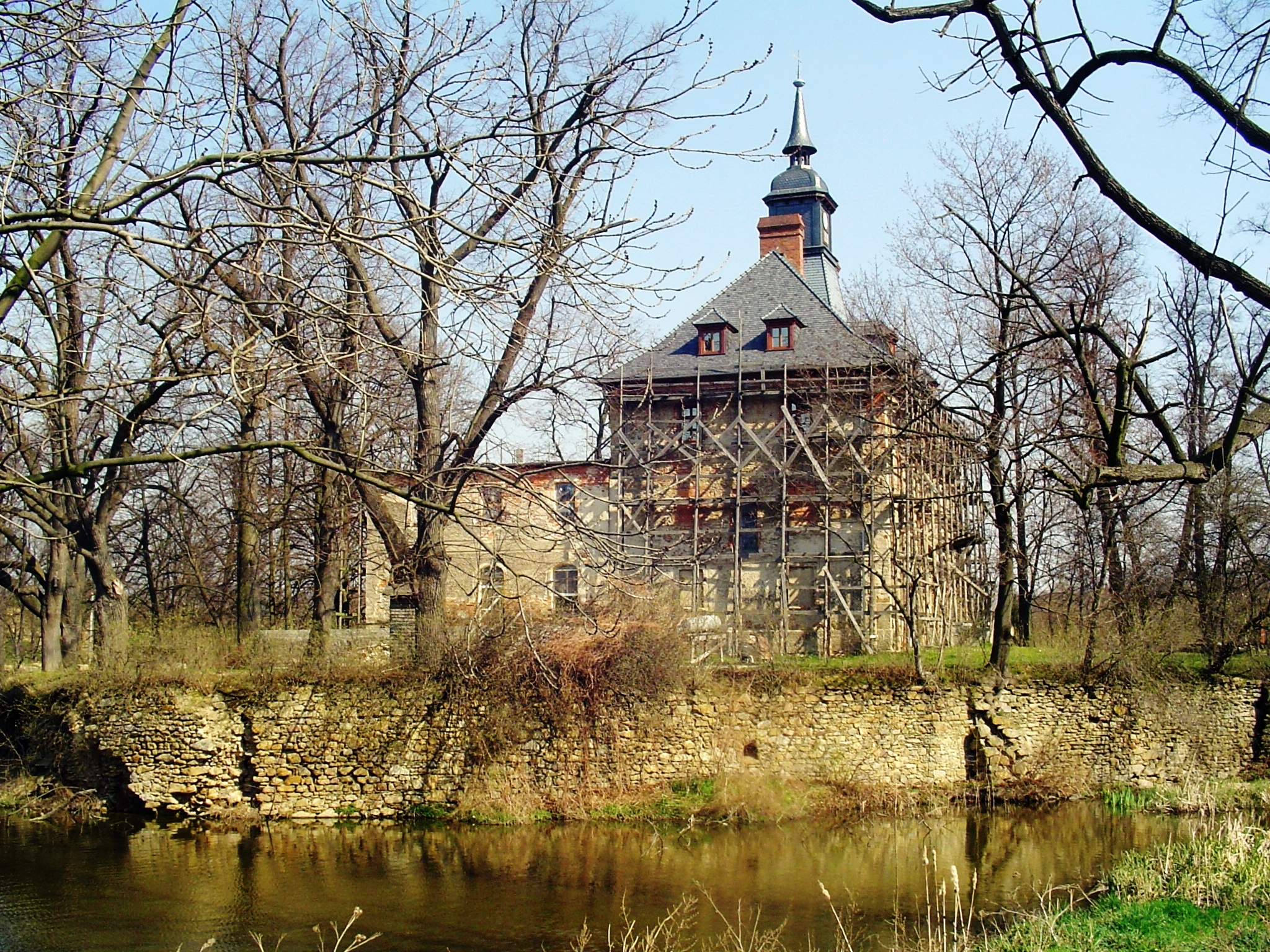 Bagieniec - dwór (na wyspie), XVI, XIX/XX